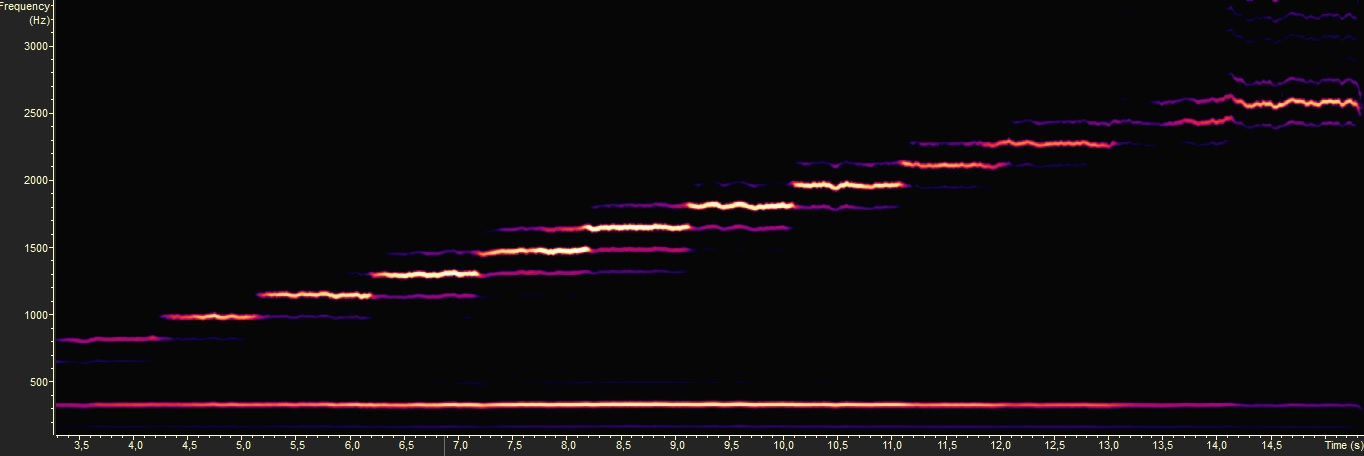 scala musicale eseguita con canto difonico, visualizzata attraverso il software "Overtone Analyzer".